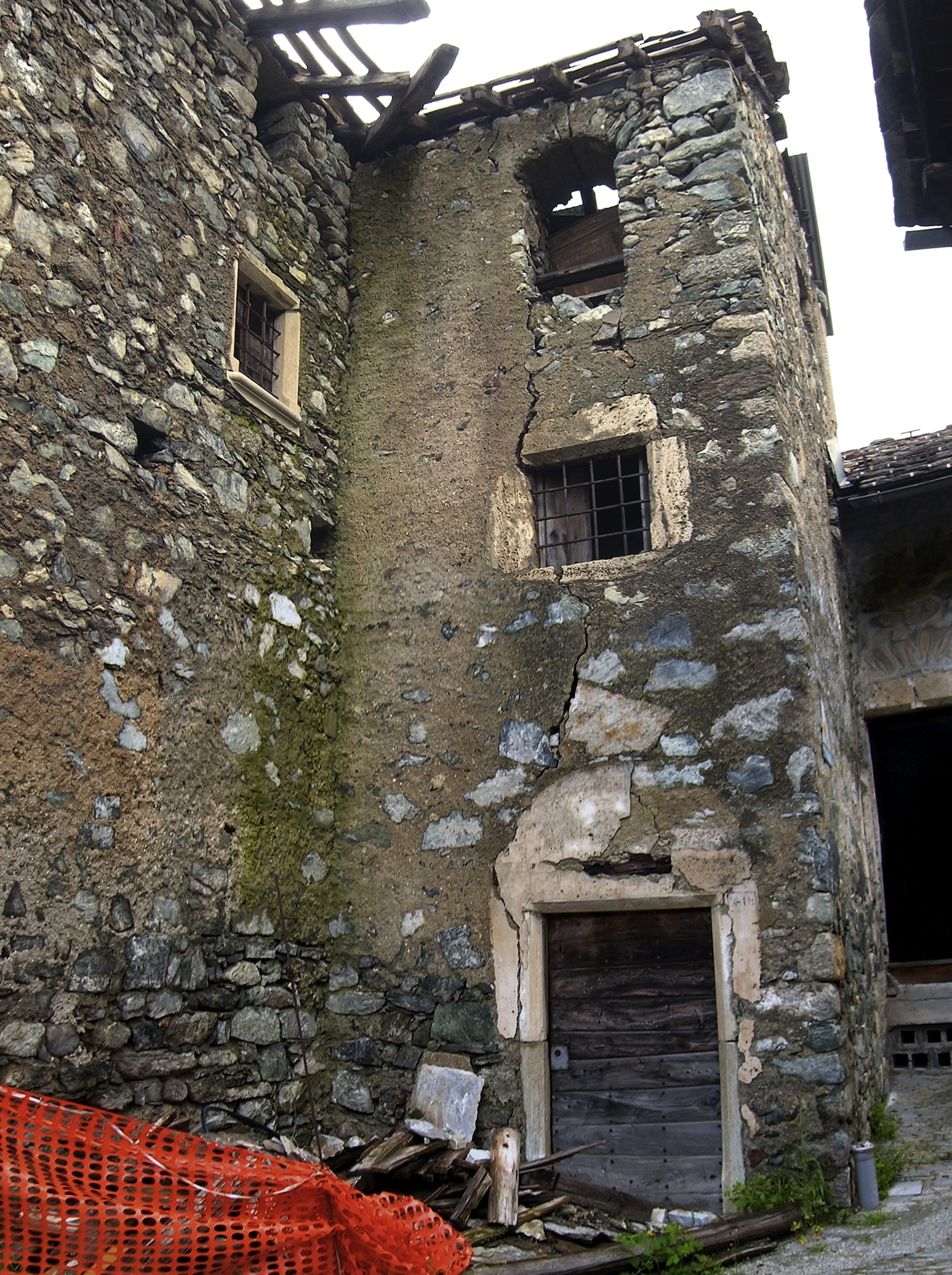 Casaforte Marseiller